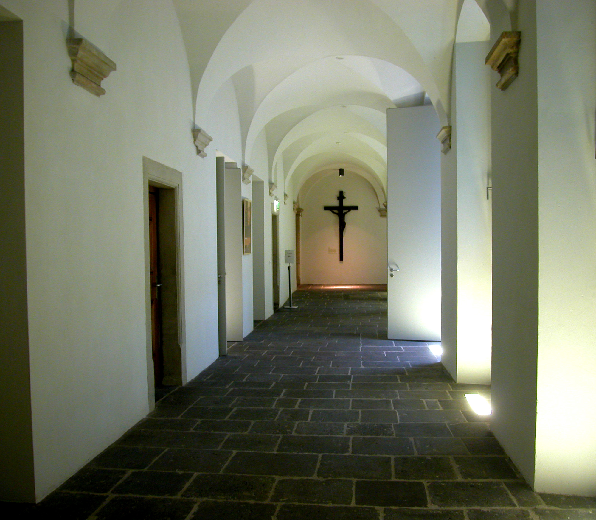 St. Maximilian in Düsseldorf, Deutschland